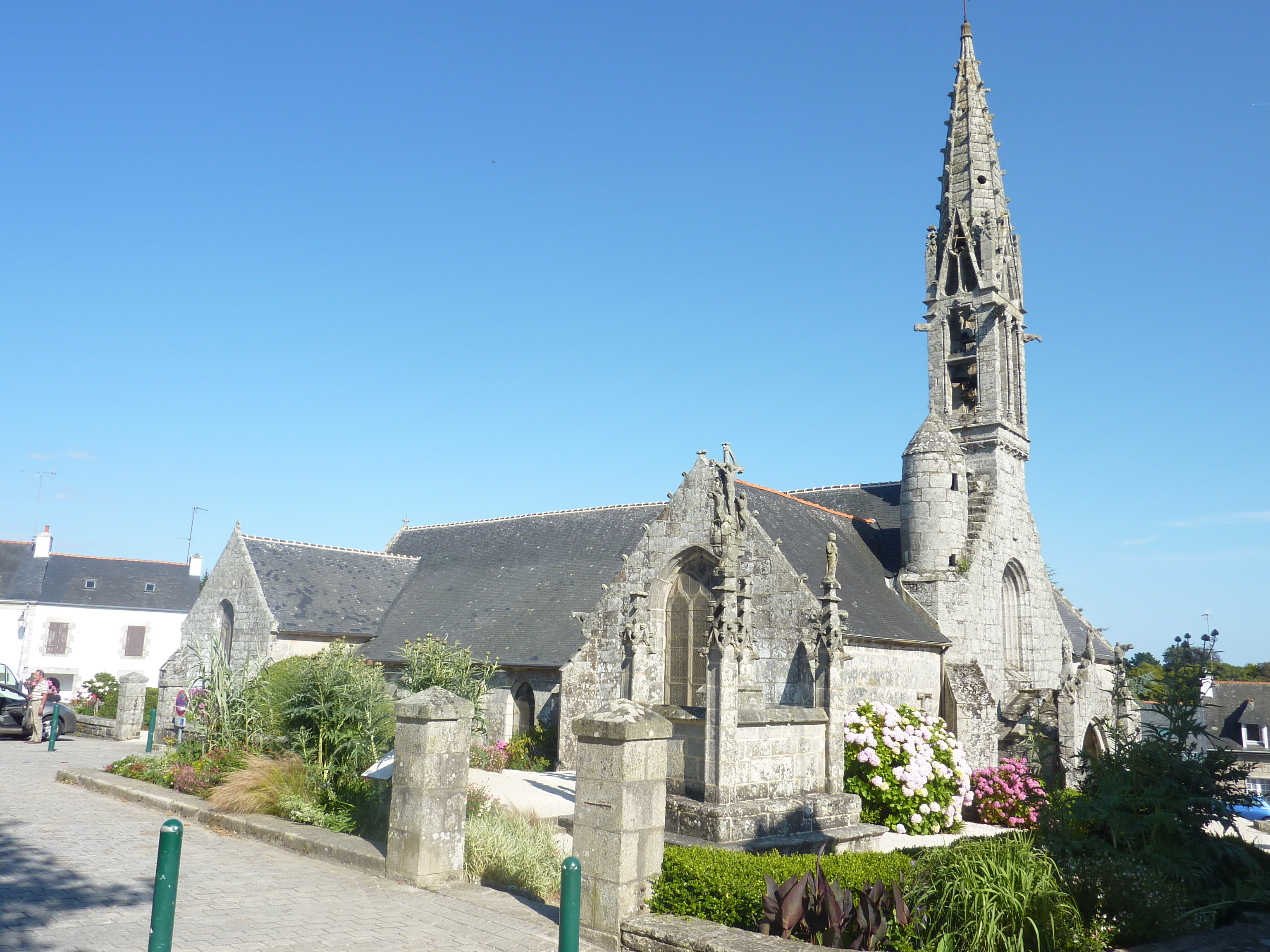 La Forêt-Fouesnant : vue d'ensemble de l'enclos paroissial (église Notre-Dame d'Izel-Vor et son calvaire), XVIème siècle